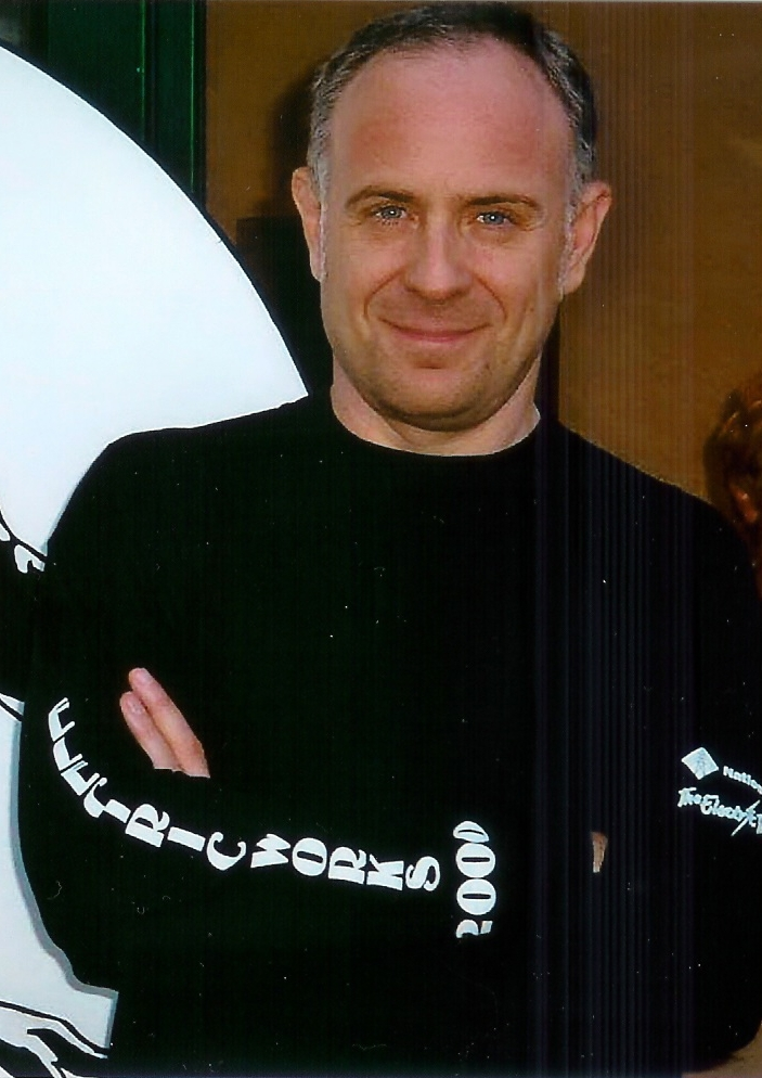 Emanuele Barison, autore di fumetti italiano.